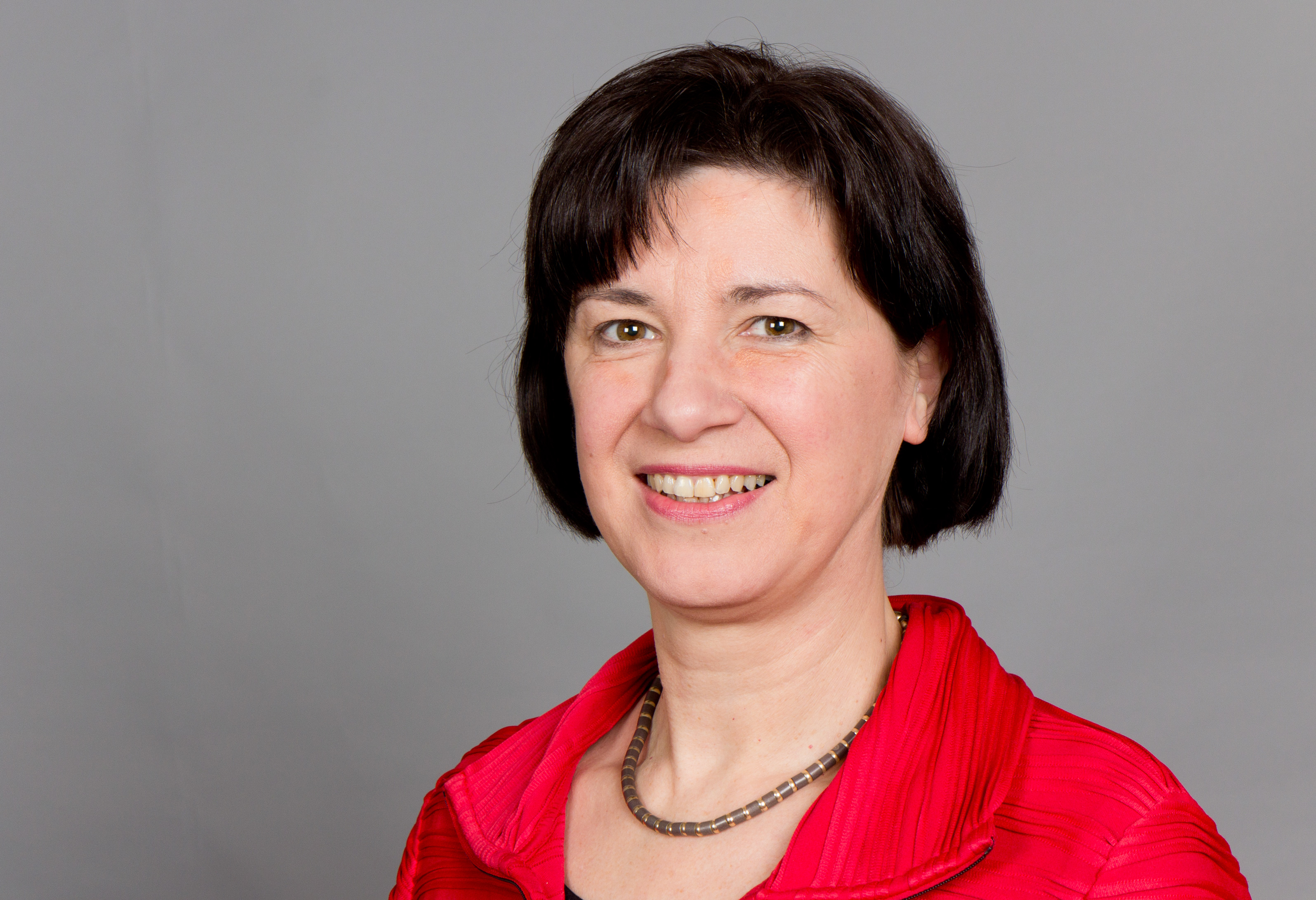 Anke Simon (* 31. März 1963 in Frankenthal) ist eine deutsche Politikerin (SPD) und Mitglied des Landtages von Rheinland-Pfalz. Landtag Rheinland-Pfalz 2014 19. bis 20. Februar 2014 in MainzDieses Foto wurde im Rahmen des Projektes „WIKI loves parliaments/Landtag Rheinland-Pfalz“ erstellt. Fragen zur Nachnutzung Wenn Sie Fragen zur Nachnutzung dieses Bildes haben, können Sie sich jederzeit gern an wenden